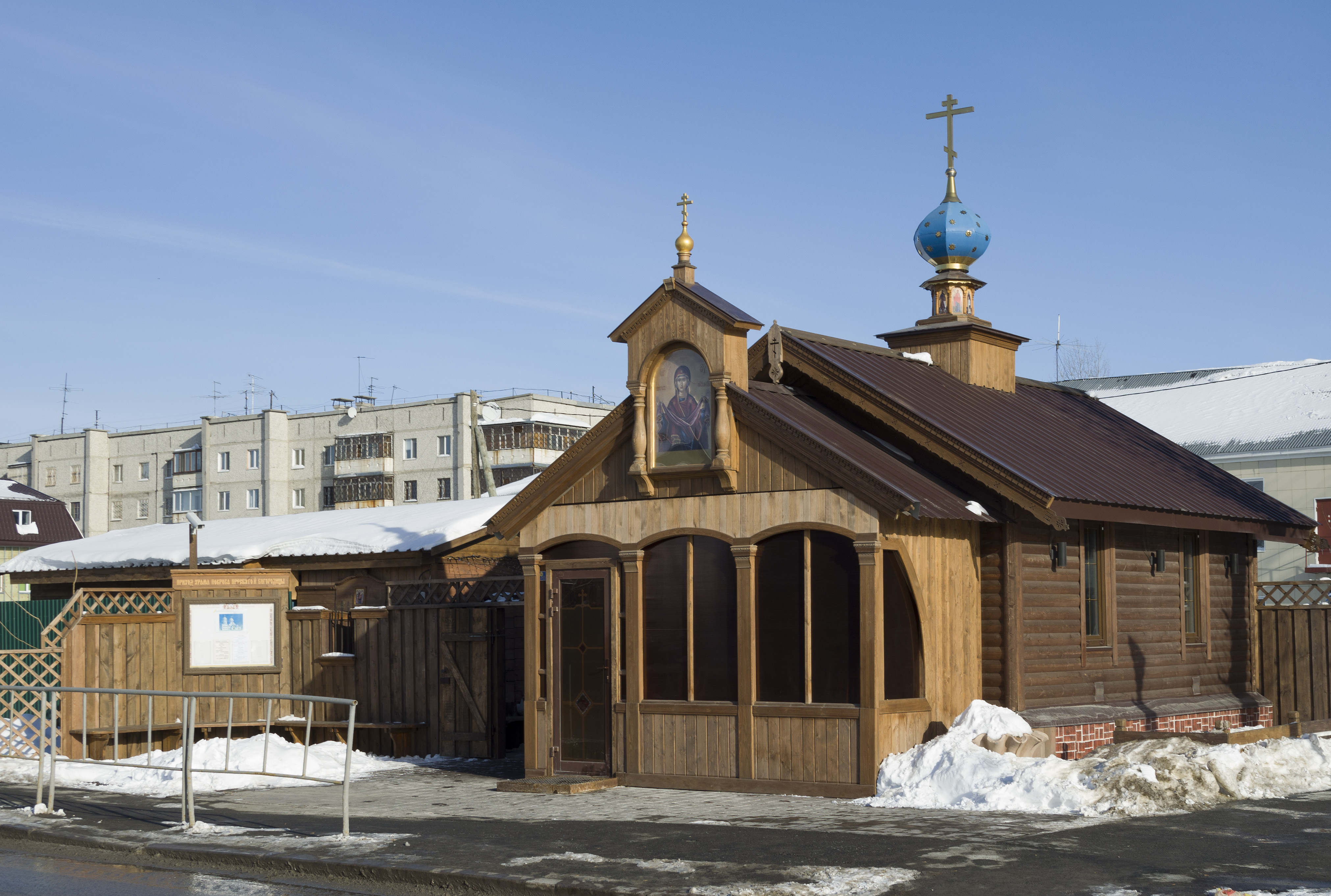 Часовня Покрова Пресвятой Богородицы